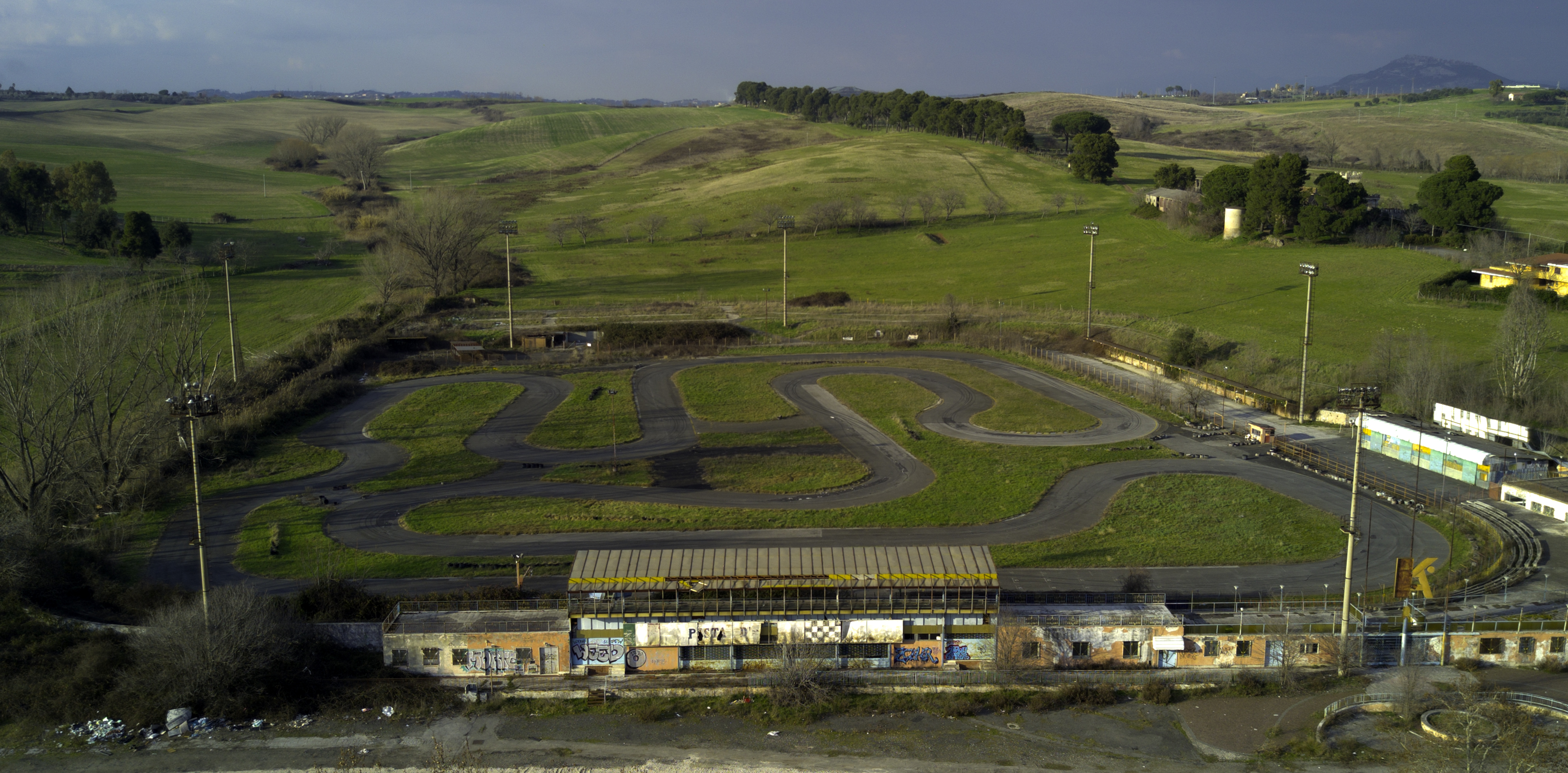 Vista completa della pista d'oro